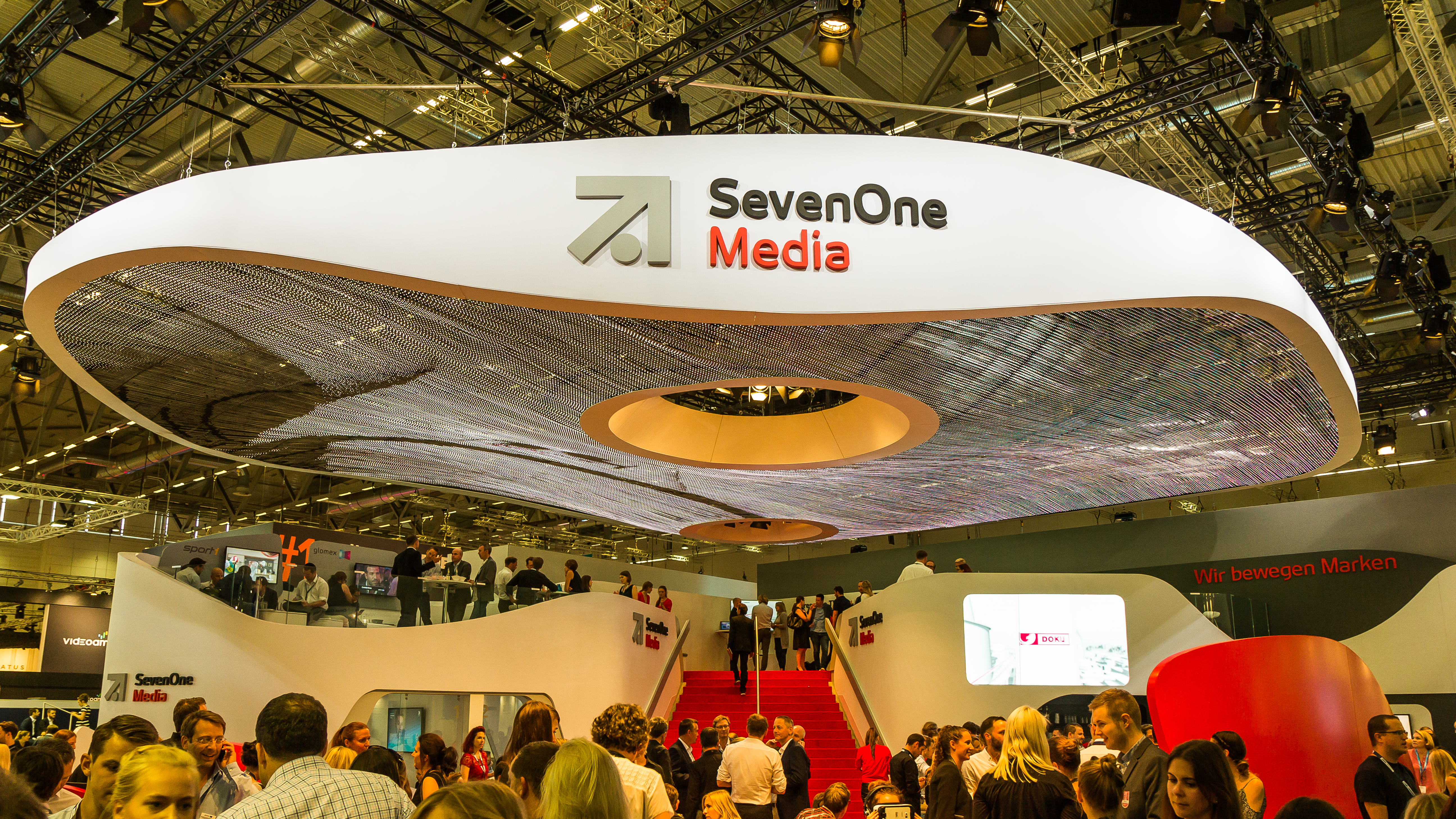 dmexco 2016. Der Stand von SevenOne Media